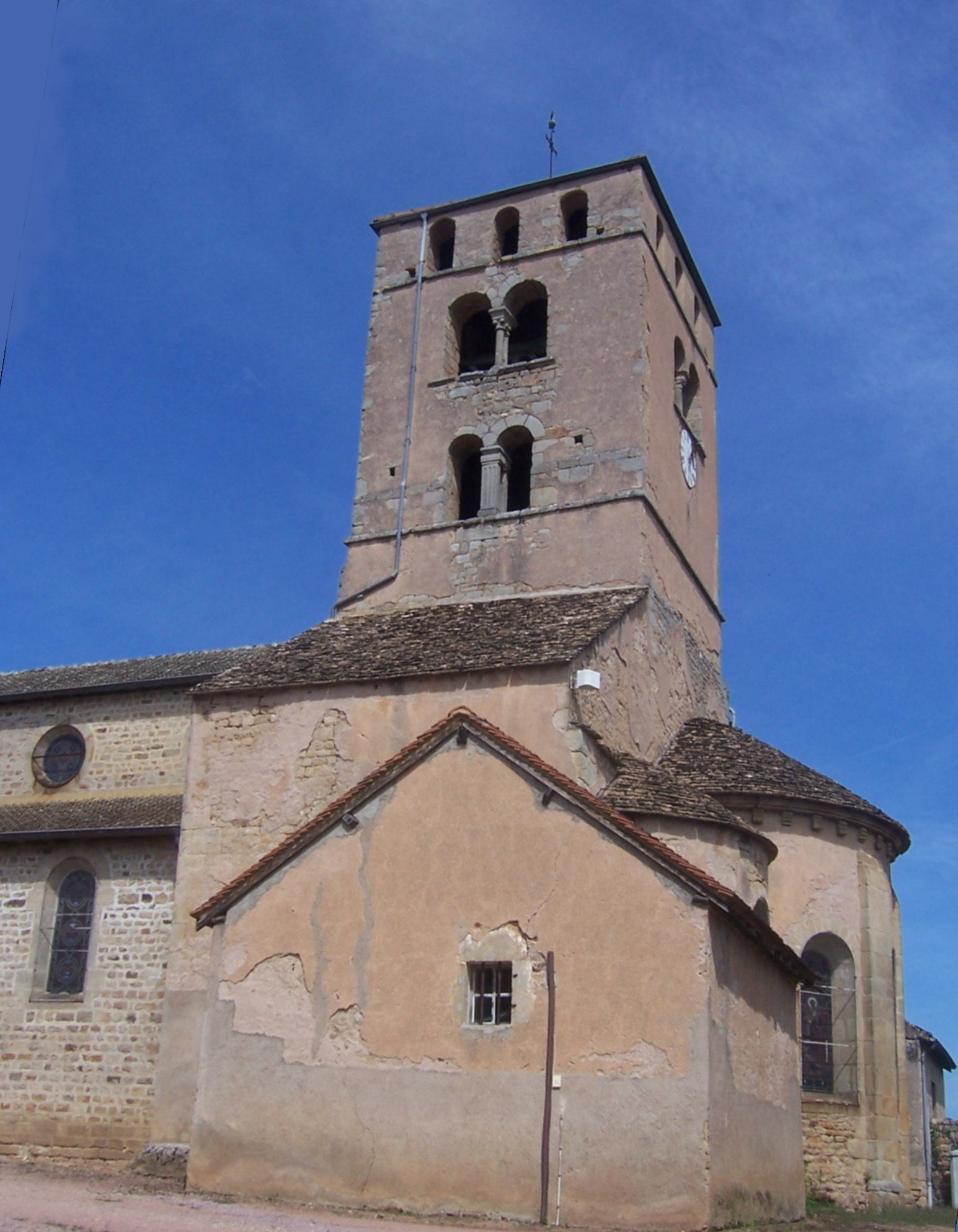 Eglise de Saint-André-le-Désert